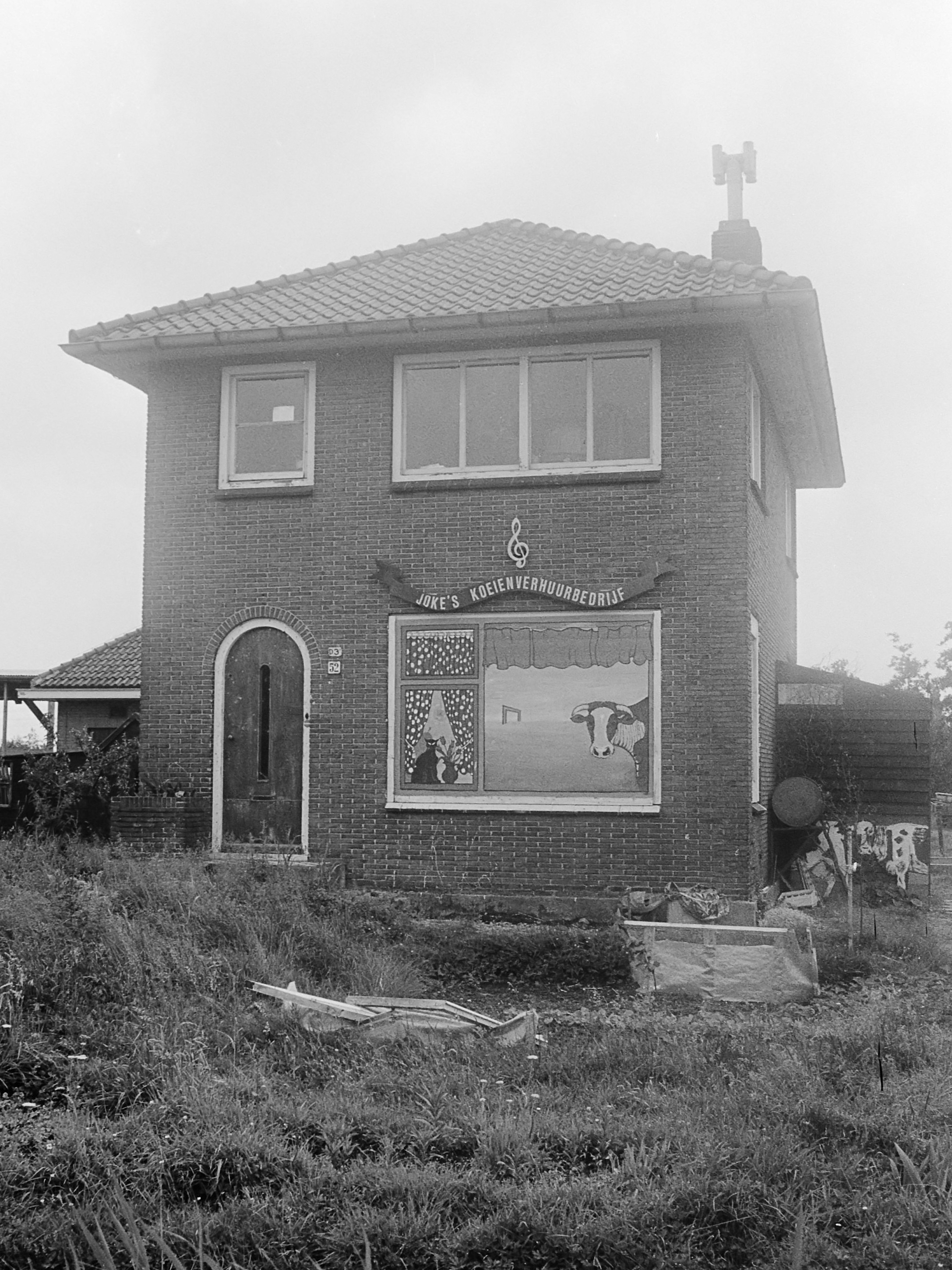 Huis in Watergraafsmeer (Amsterdam) met het opschrift "Joke's koeienverhuurbedrijf" 26 juni 1979